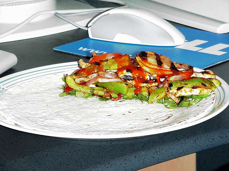 Fajita